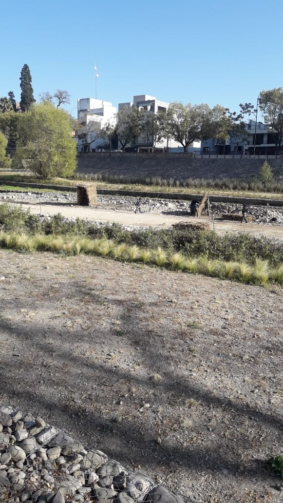 esta imagen muestra como se va preparando el lugar donde se realizara horas mas tarde la marcha evocativa